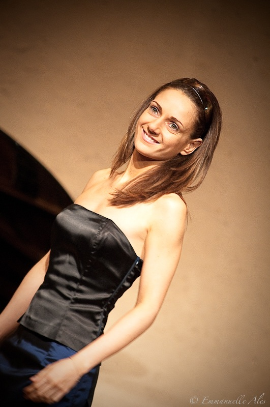 La pianiste Emmanuelle Swiercz